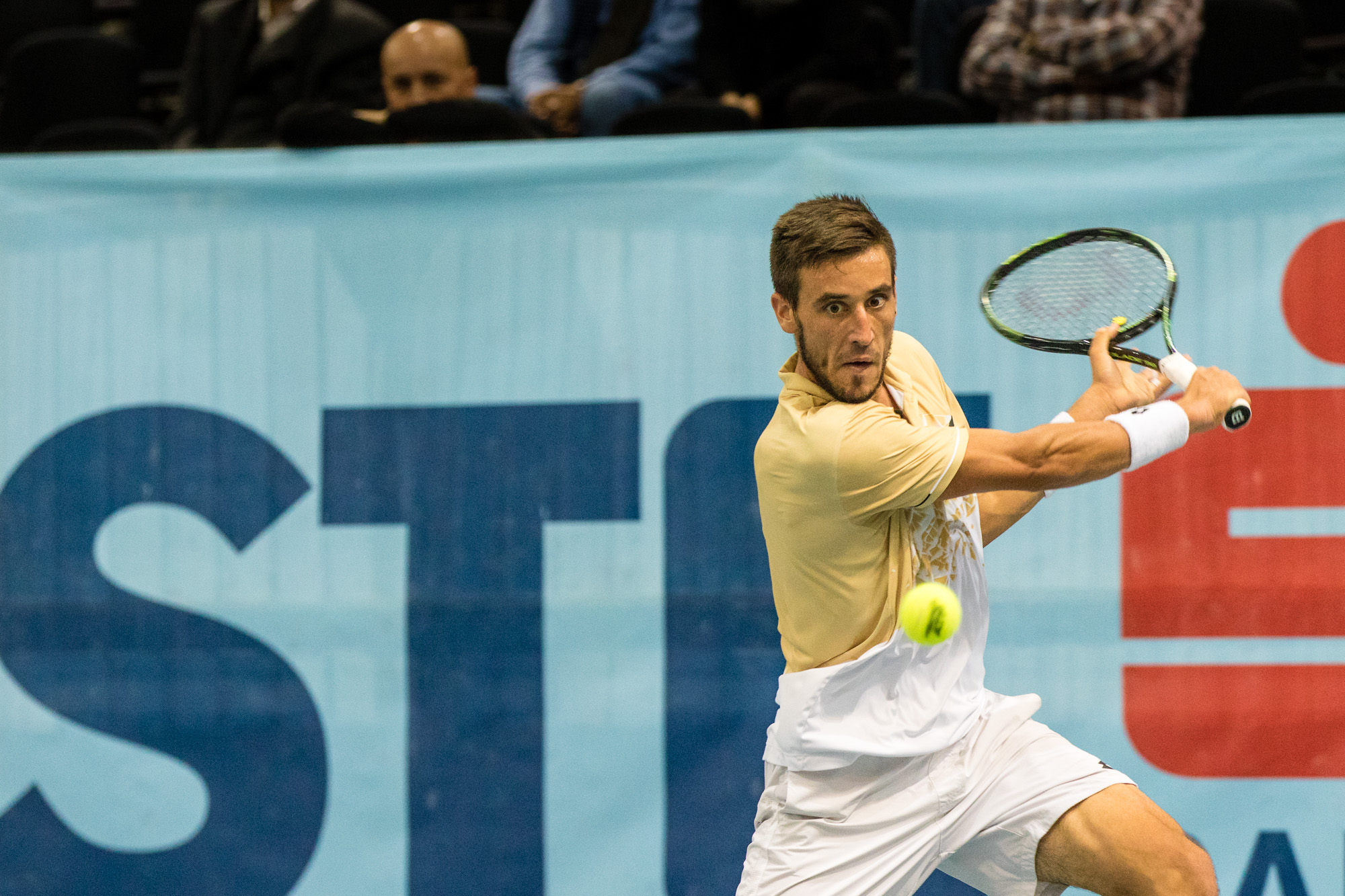 Damir Dzumhur (BIH) spielt gegen Adam Pavlasek (CZE) in Qualifikation zu Erste Bank Open ATP World Tour 500 in Wien am 23.10.2016